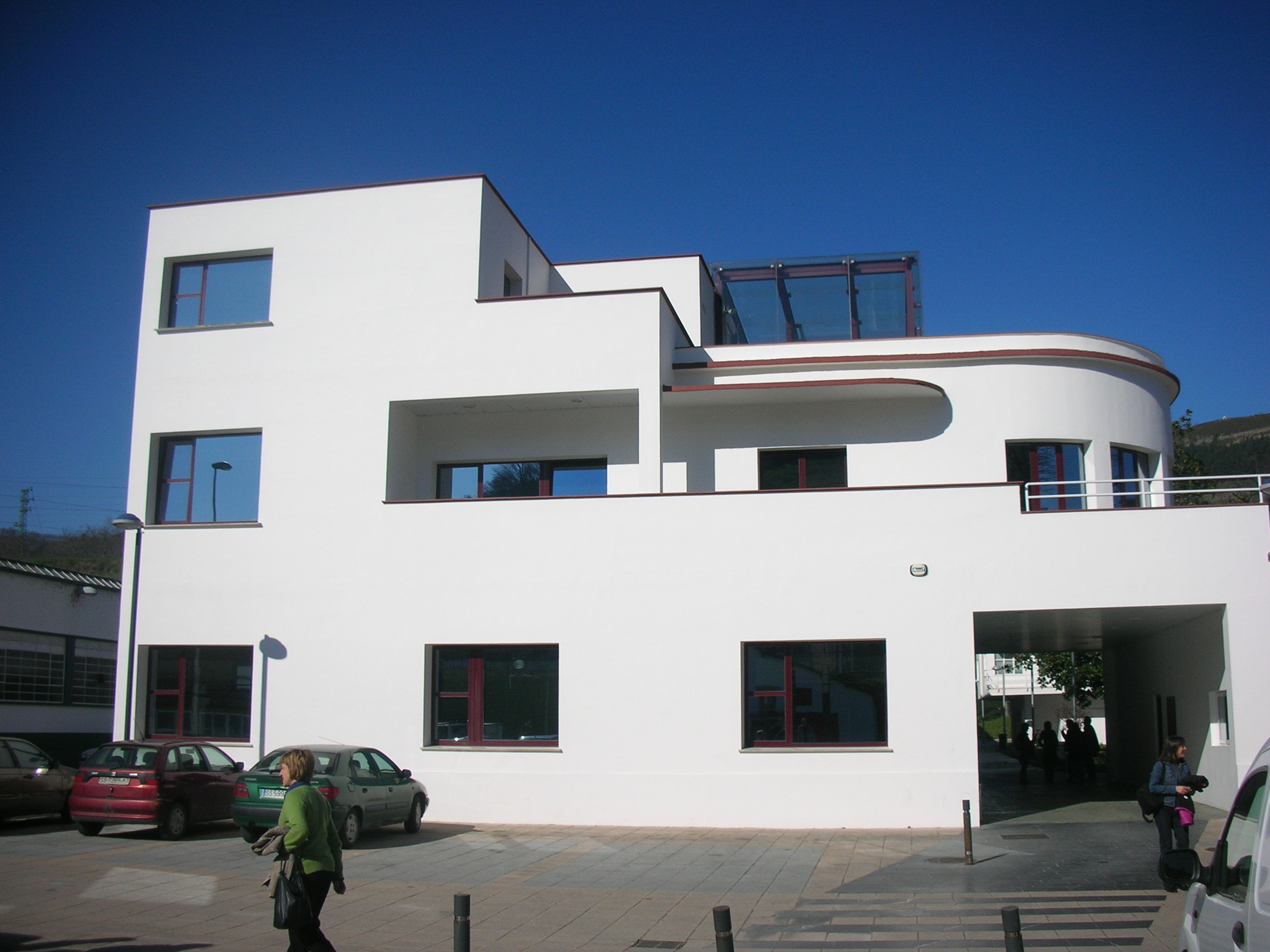 Andoaingo Laborde anaiak eraikina.